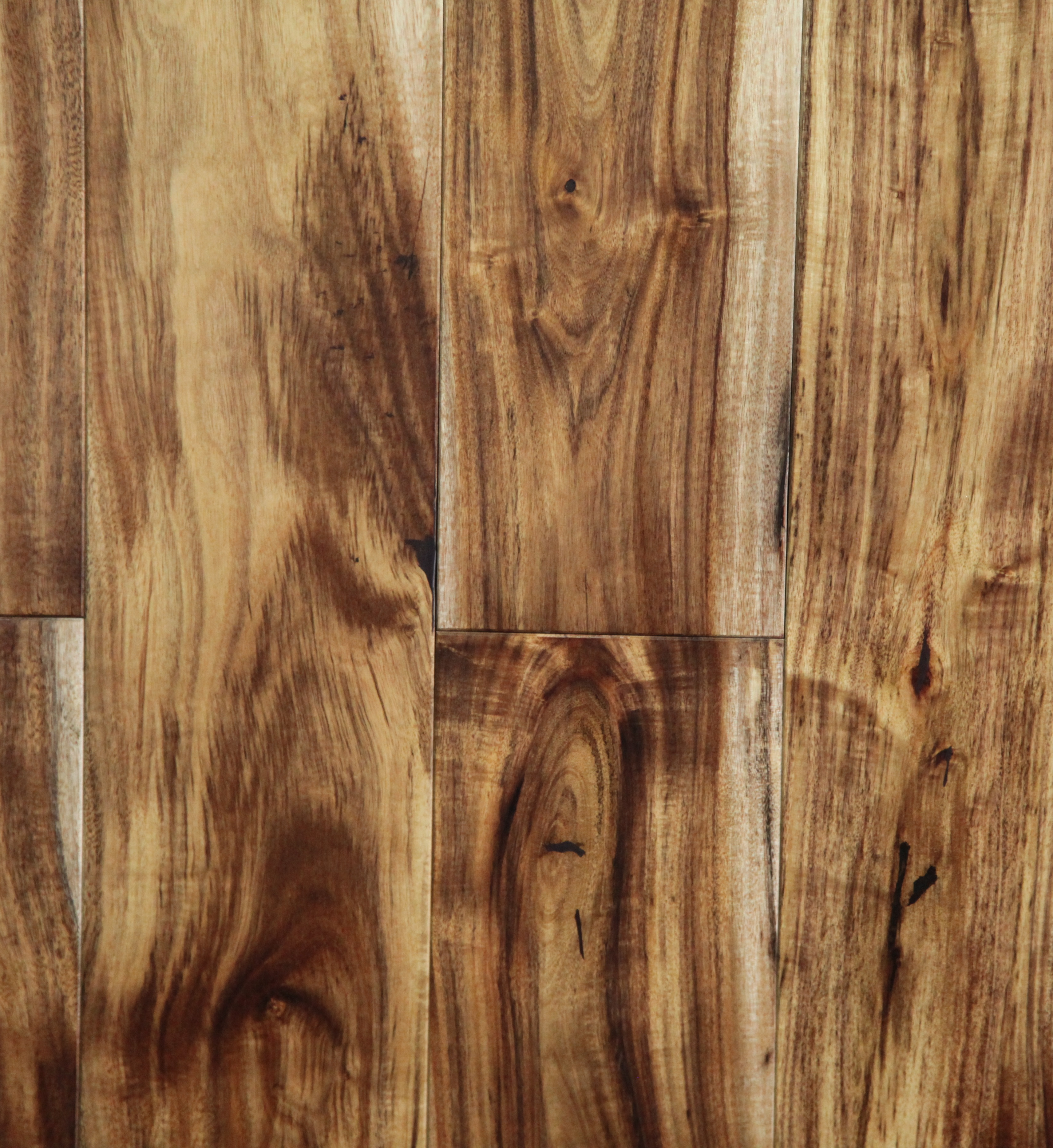 Акация недавно срубленная и потому более светлая